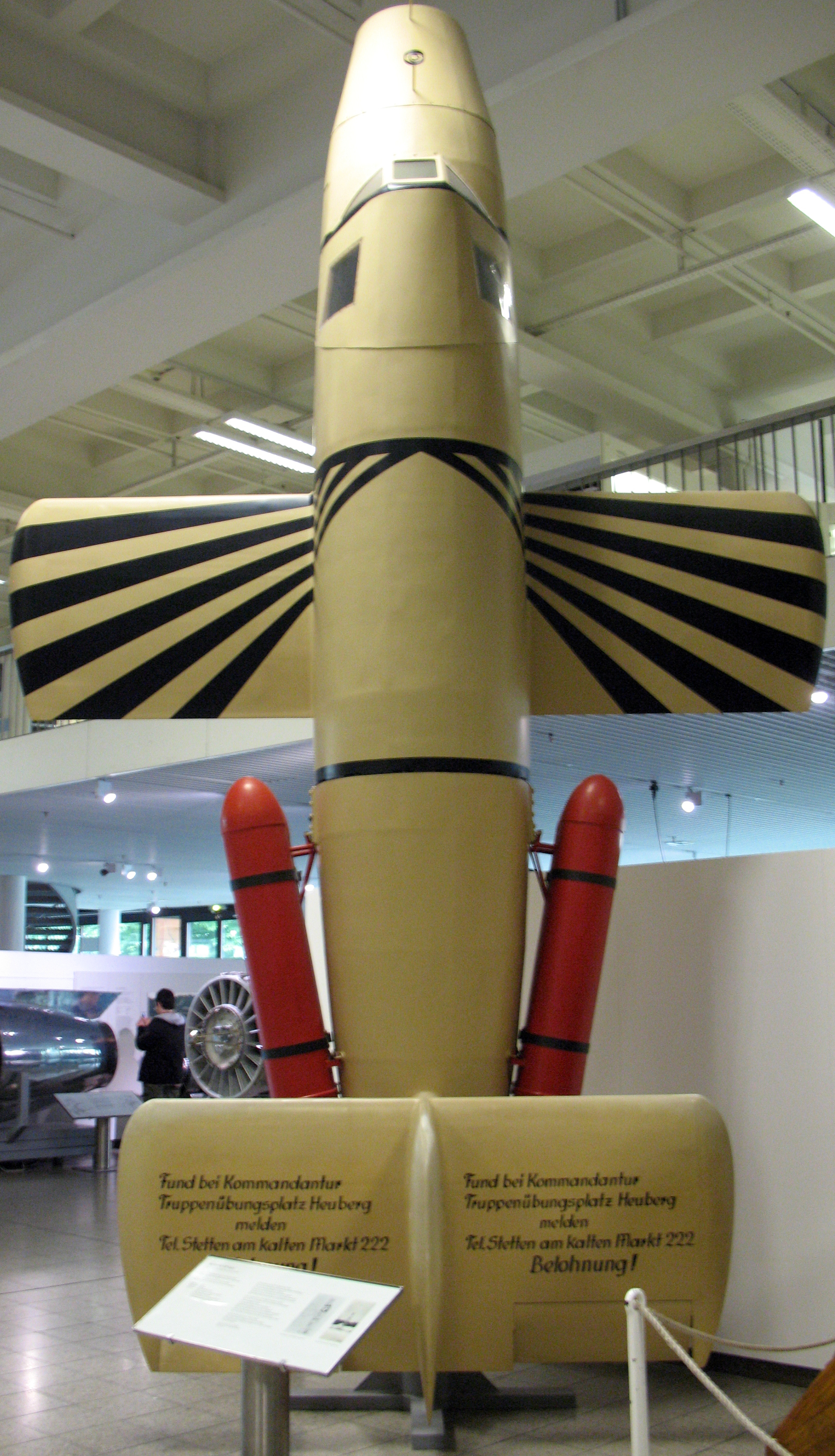 Bachem Ba 349 Natter; Backem-Werk GmbH, Waldsee/Württemberg, 1944/45